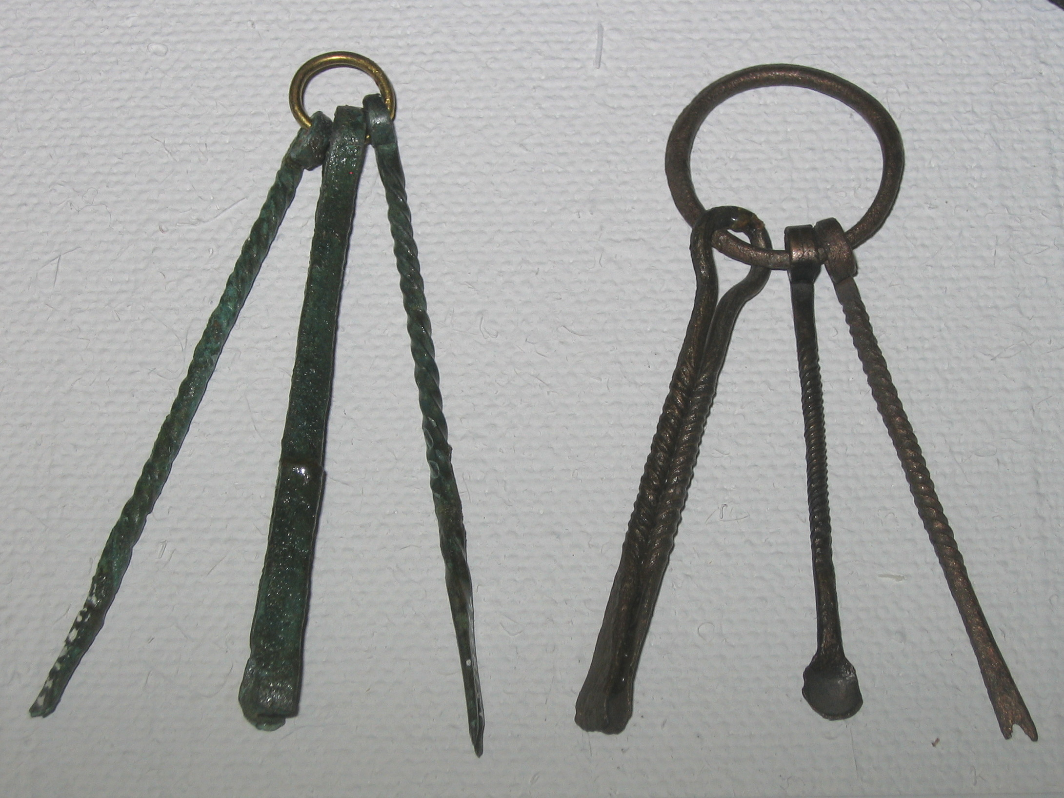 Zwei Toilettbestecke mit Pinzette, Kratzer und Ohrlöffelchen aus Bronze. Gefunden in Matzendorf, Landkreis Amberg Sulzbach (Inventar Nr. A1250) und Hub, Landkreis Schwanburg (Inventar Nr 1978/71). Fotografiert im Historischen Museum Regensburg. Datierung etwa Hallstattzeit Stufe Ha C.